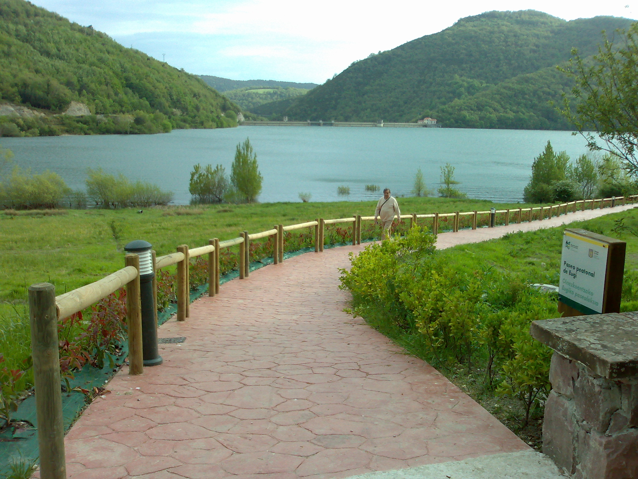 Eugiko urtegia Esteribarren.